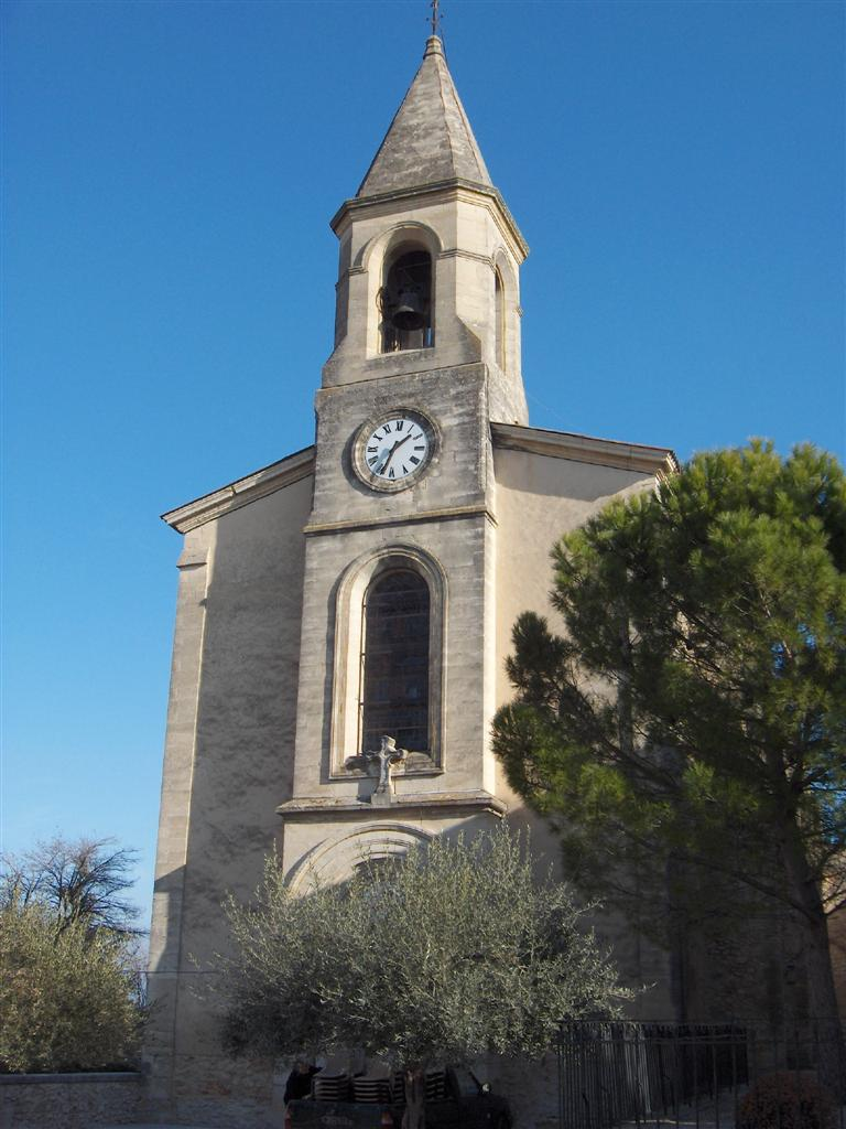 Eglise de La Calmette